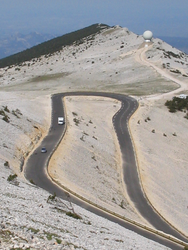 Hairpin on Mont Ventoux, june 2005